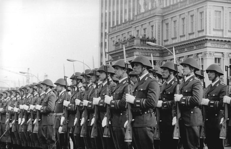 Berlin, 25. Jahrestag DDR-Gründung, Wachaufzug ADN-ZB Gahlbeck 7.10.74 Berlin: 25. Jahrestag-Wachaufzug -Tausende Berliner und Gäste der DDR-Hauptstadt wohnten am 7.10.74 vor dem Mahnmal für die Opfer des Faschismus und Militarismus dem Großen Wachaufzug anläßlich des 25. Jahrestages der Gründung der DDR bei. Nachdem eine Ehrenformation der Nationalen Volksarmee zum Mahnmal defilierte, erfolgte unter den Klängen des Präsentiermarsches die Wachablösung.